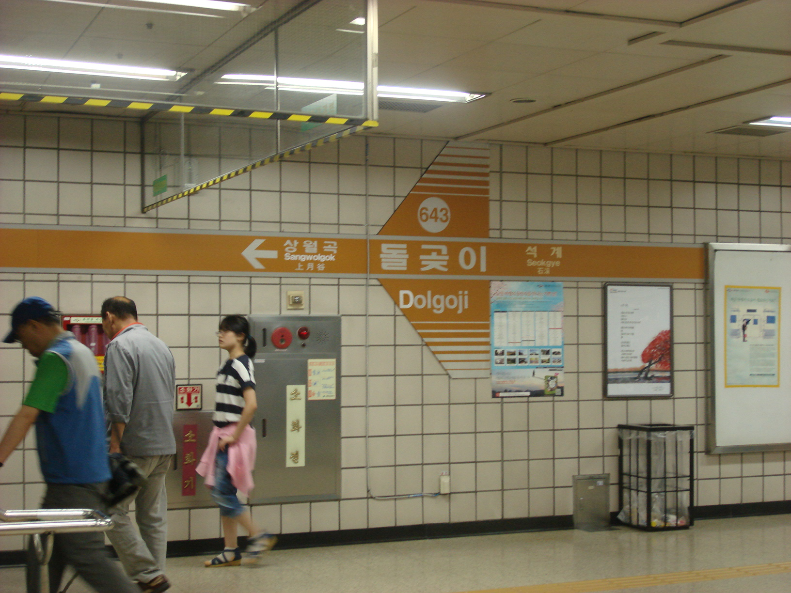 6호선 돌곶이역 역명판